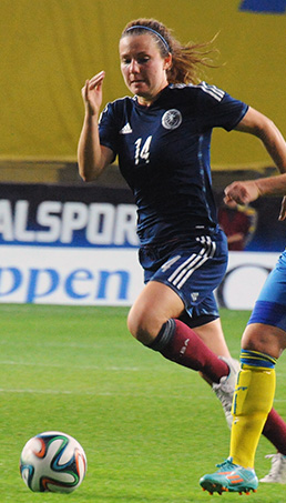 a_82_1906